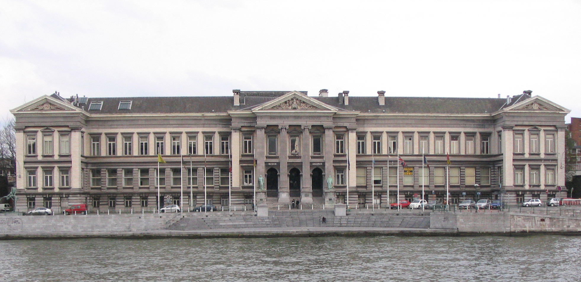 Institut Zoologique (Ulg), quai van Beneden, université de Liège (1888, Lambert Noppius)